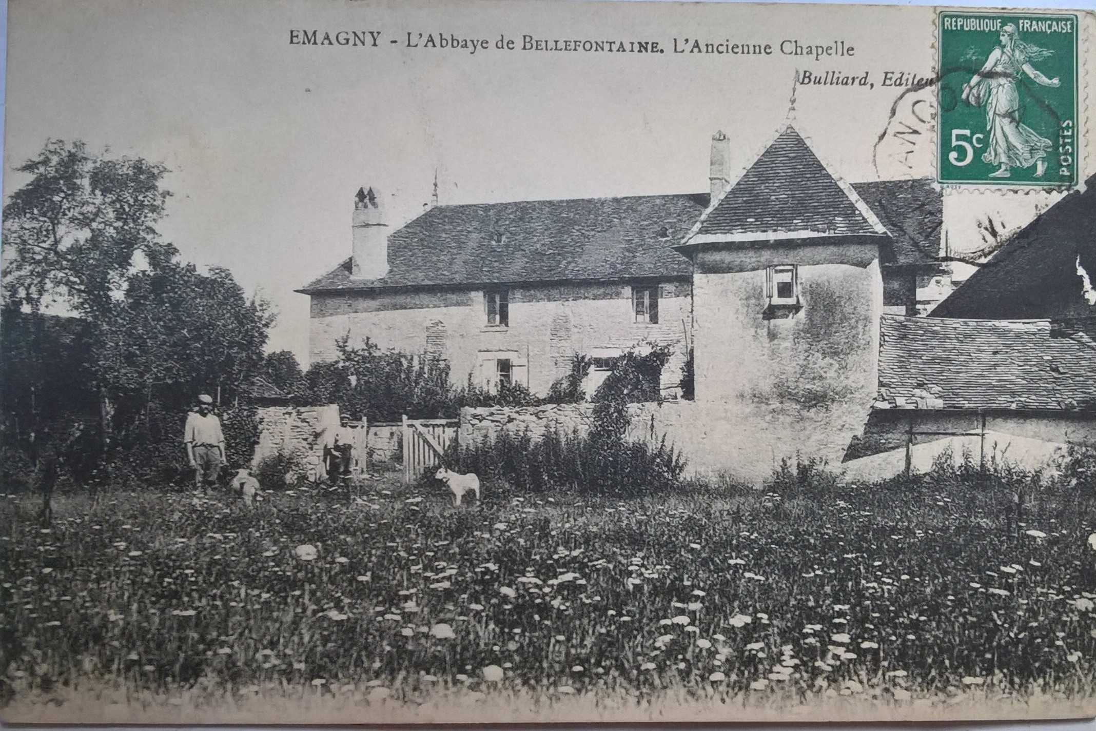 Carte postale représentant la chapelle du Prieuré (ou Abbaye) de Bellefontaine à Emagny (25170), Buillard Editeur. Carte ayant été en circulation et comportant un cachet postal daté de 1911. Photographe inconnu.